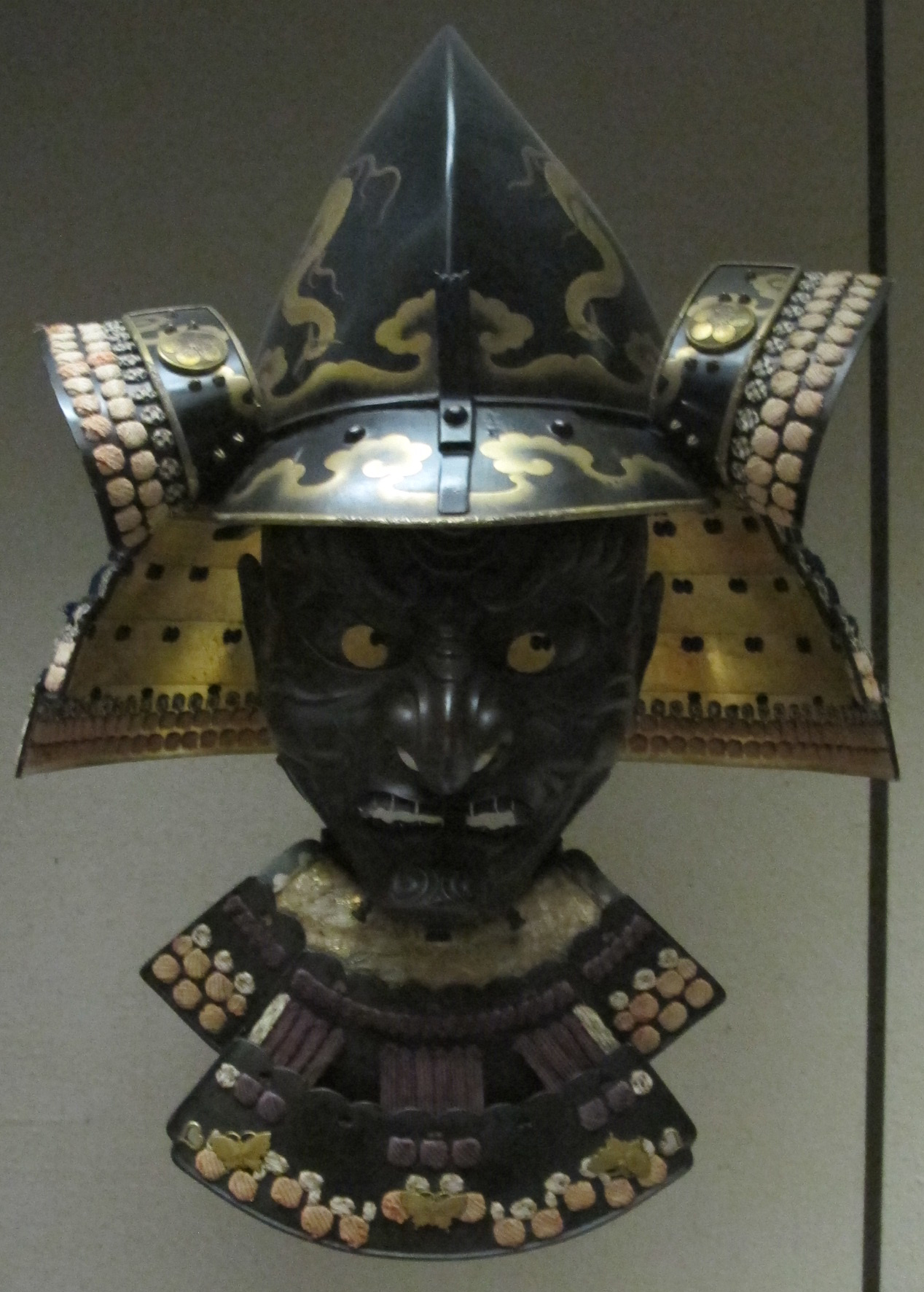 Giappone, elmo e protezione per collo, 1512 ca